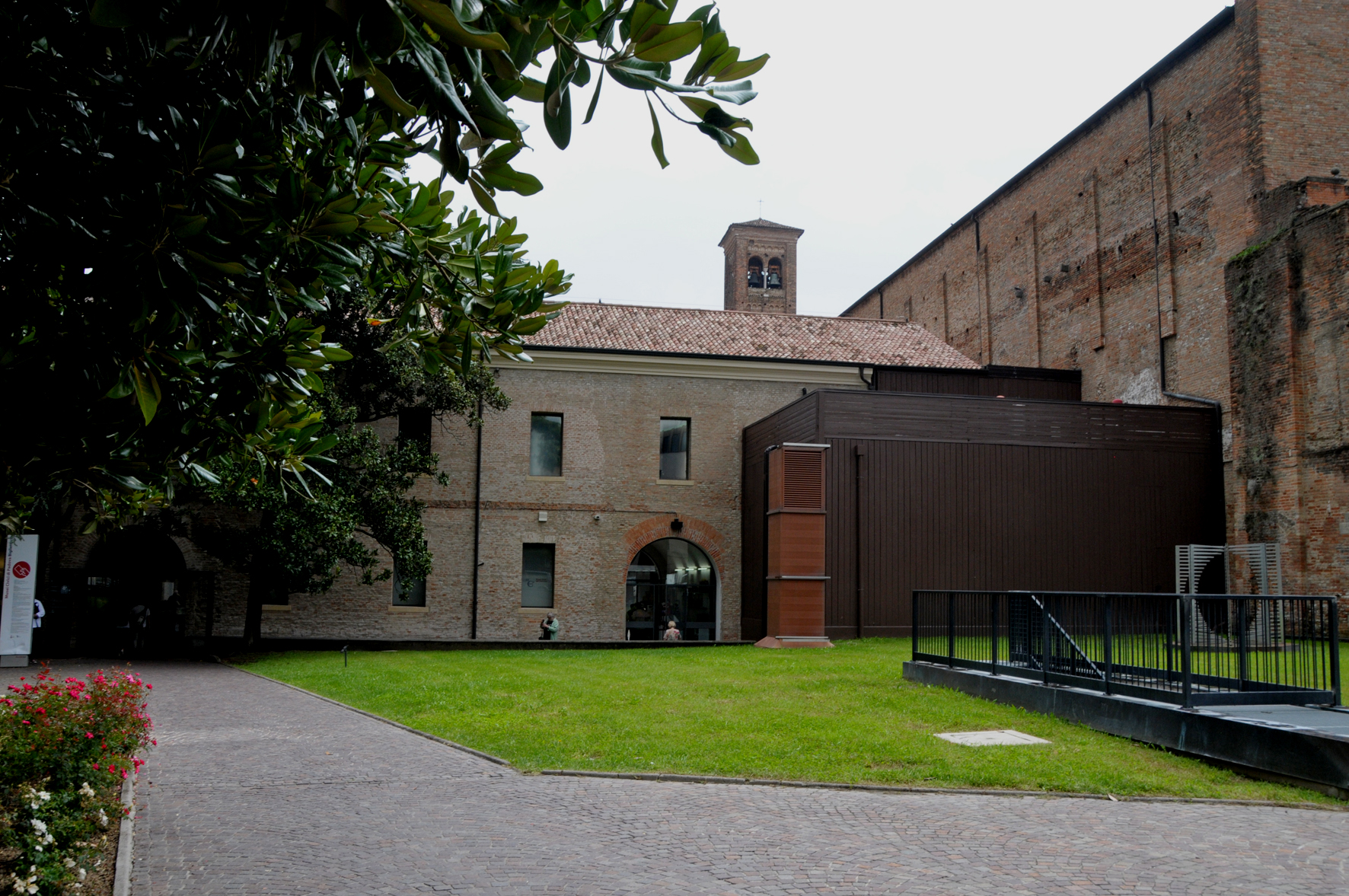 Musei civici agli Eremitani This is a photo of a monument which is part of cultural heritage of Italy.